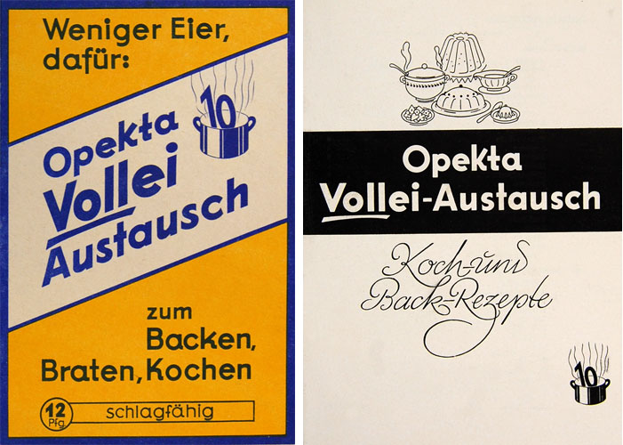 Opekta-Vollei-Austausch ist auf der Grundlage von Milcheiweiß hergestellt und hat die Aufgabe in der Koch- und Backwirkung an die Stelle von Eiern zu treten. 1 Beutel (20g) entspricht in der Back-und Kochwirkung 2 Hühnereiern.